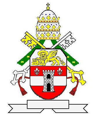 Eigen tekening. Robert Prummel Paus Johannes XXIII was altijd al in heraldiek geïnteresseerd geweest. Mgr.Bruno Bernard Heim schreef in zijn boek over de Kerkelijke heraldiek dat hij al enige dagen vóór de verkiezing met een wapen voor zijn oude vriend begonnen was. Twee uur na de verkiezing was een eerste tekening per luchtpost onderweg naar Rome. De nieuwgekozen paus keurde het eerste ontwerp niet goed; hij wnste, net als Paus Pius X de gevleugelde leeuw van Sint-Marcus die hij als patriarch van Venetië in zijn eigen wapen had geplaatst ook als paus te behouden. De wil van de paus buigt de anders zo strenge heraldische regels en Mgr.Heim plaatste een schildhoofd met een gouden leeuw op een zilveren veld in het wapen. Tijdens een audiëntie op de dag voor de kroning vroeg de paus aan Heim of de leeuw niet wat "minder woest en trans-alpijns, met minder tanden en klauwen", kortom, "wat menselijker" kon maken. In de nacht van 3 november 1958 ontstond een nieuw wapen met een leeuw die de nagels had ingetrokken maar in de ogen van de paus nog geen genade kon vinden. de leeuw die en face was getekend was te mager en, zoo citeert Heim de paus;"Hij moet wat meer vlees op zijn lichaam hebben". De daarop getekende leeuw beviel de paus zozeer dat hij opdracht gaf het wapen ogenblikkelijk te publiceren. Heraldisch bestaat er geen verschil tussen een woeste en een minder woeste leeuw. De keus voor een vriendelijk-ogend dier zegt ons wel veel over het karakter van de paus die al snel de bijnaam " Johannes de Goede" verwierf. Vanwege het copyright is het hier op Wiki gepubliceerde pauselijk wapen door mij getekend.Op , is een andere tekening van dit wapen te zien.